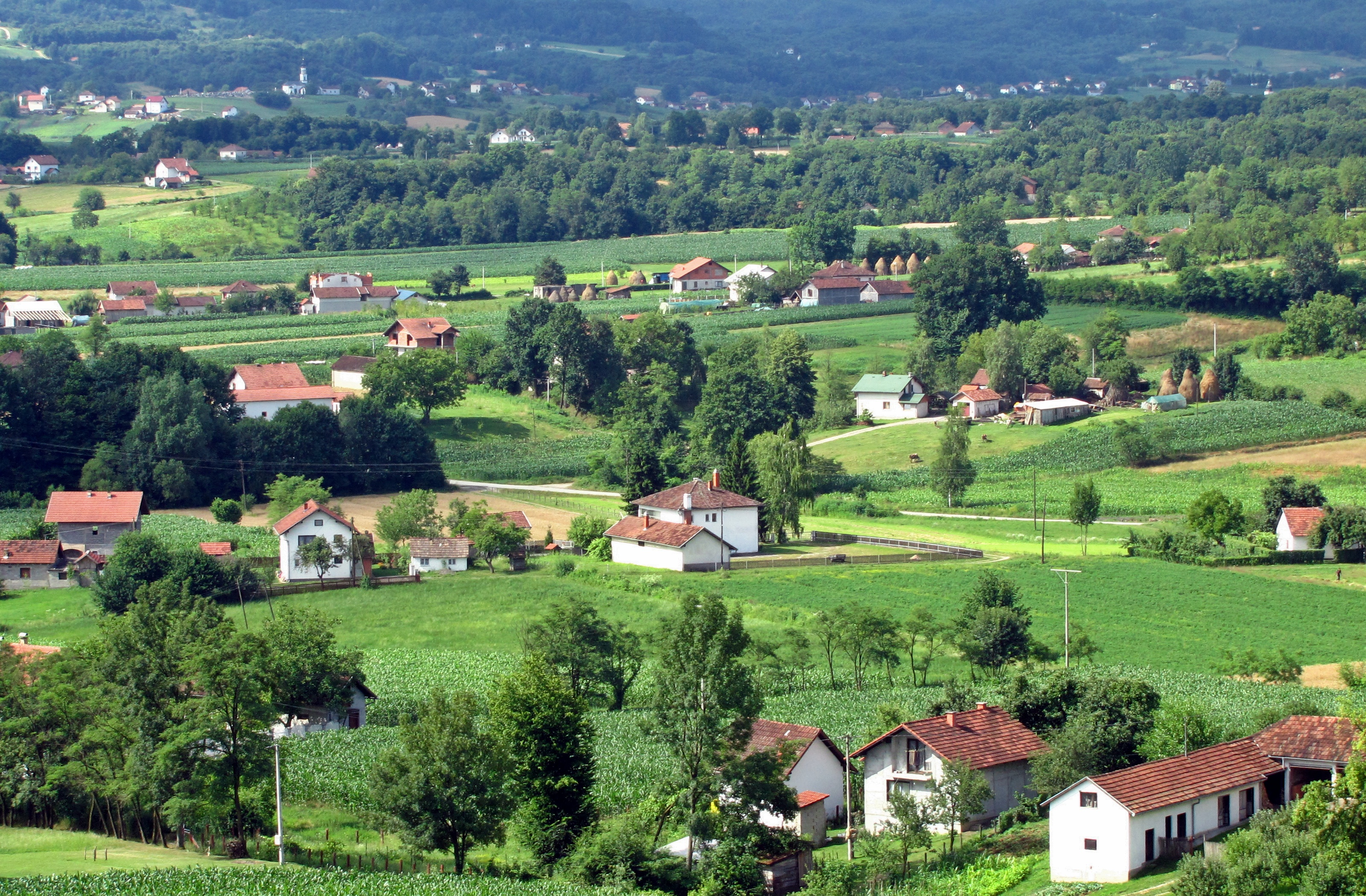 Велика Буковица